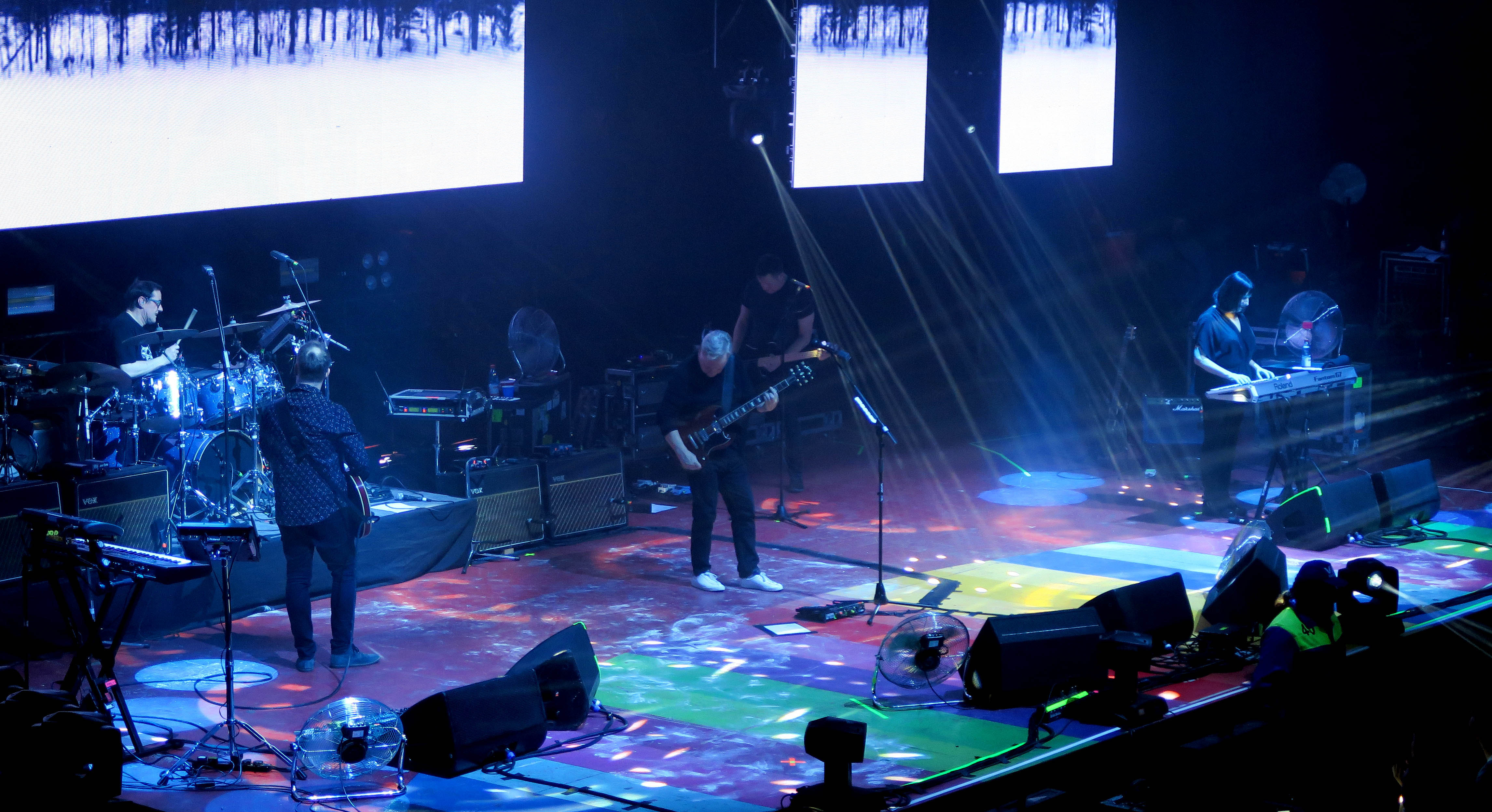 New Order, Chile 2019